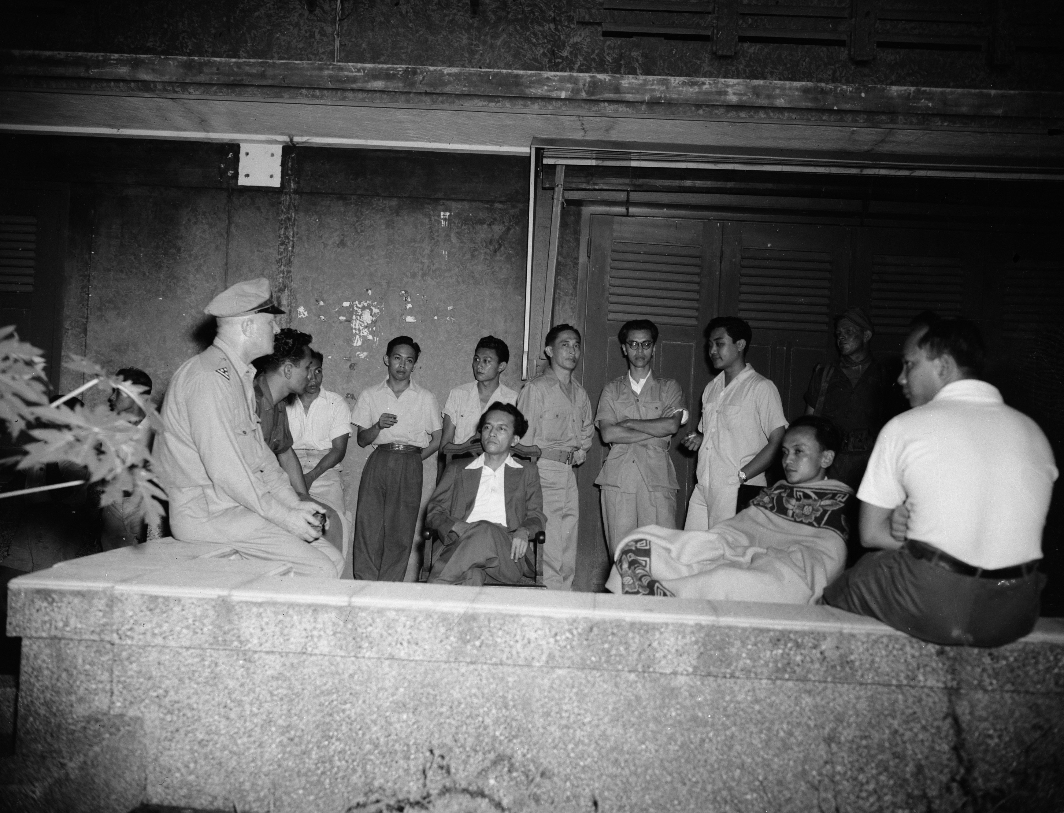 Collectie / Archief : Fotocollectie Dienst voor Legercontacten Indonesië Reportage / Serie : [DLC] Nederlandse operaties tegen Republikeinse autoriteiten en instanties Beschrijving : Een aantal gearresteerde Republikeinse voormannen, waaronder vice-premier dr. A.K. Gani zitten op een veranda. Links een Nederlandse kolonel van het KNIL (basiscommandant K. Drost?) Annotatie : Met deken vice-minister Tamzil? Datum : 20 juli 1947 Locatie : Batavia, Indonesië, Jakarta, Nederlands-Indië Fotograaf : Fotograaf Onbekend / DLC Auteursrechthebbende : Nationaal Archief Materiaalsoort : Negatief (zwart/wit) Nummer archiefinventaris : bekijk toegang 2.24.04.03 Bestanddeelnummer : 11657